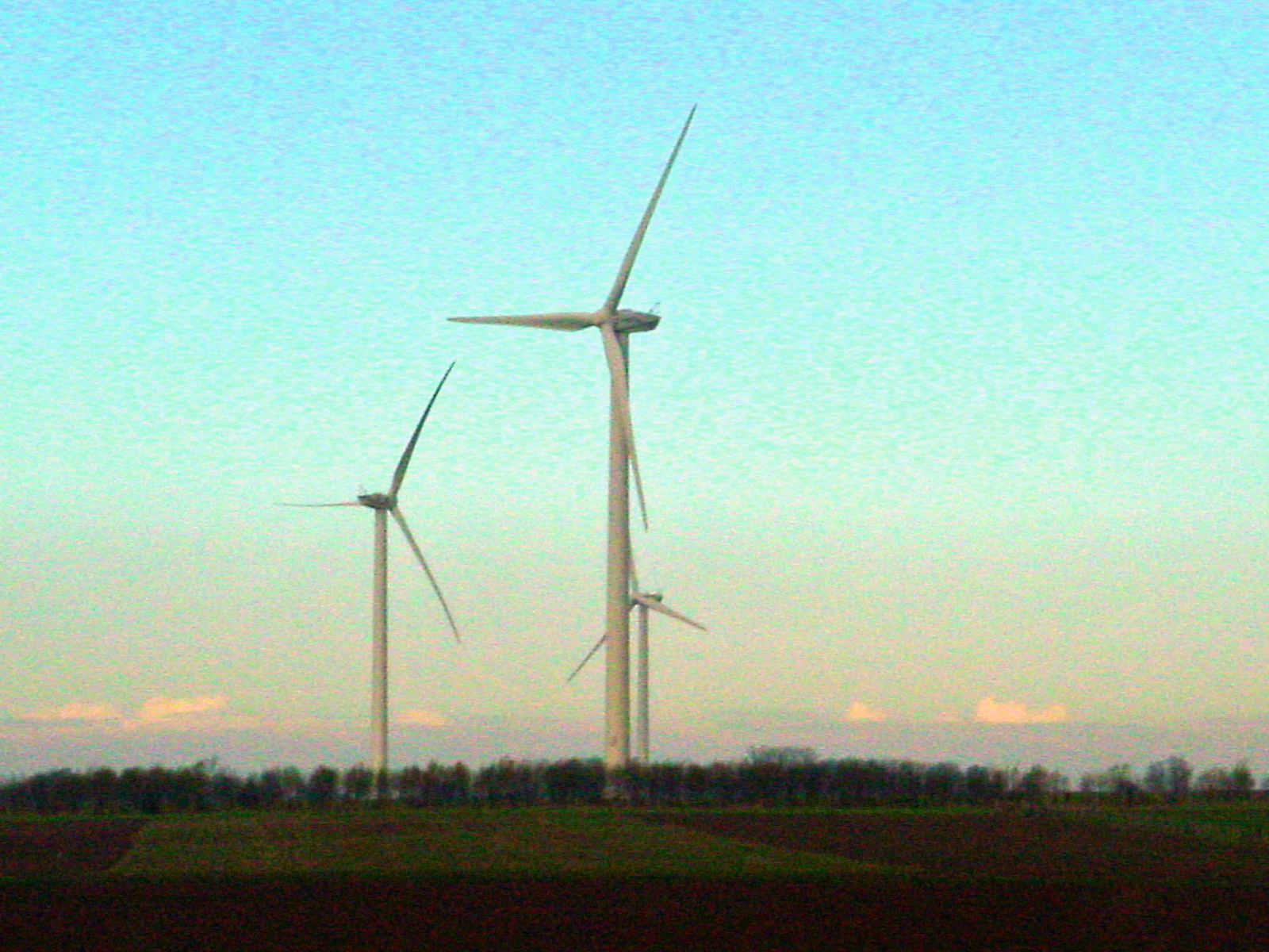 Éoliennes (Fresnes-Tilloloy, Somme, France) vue d'un jardin vers St-Maxent